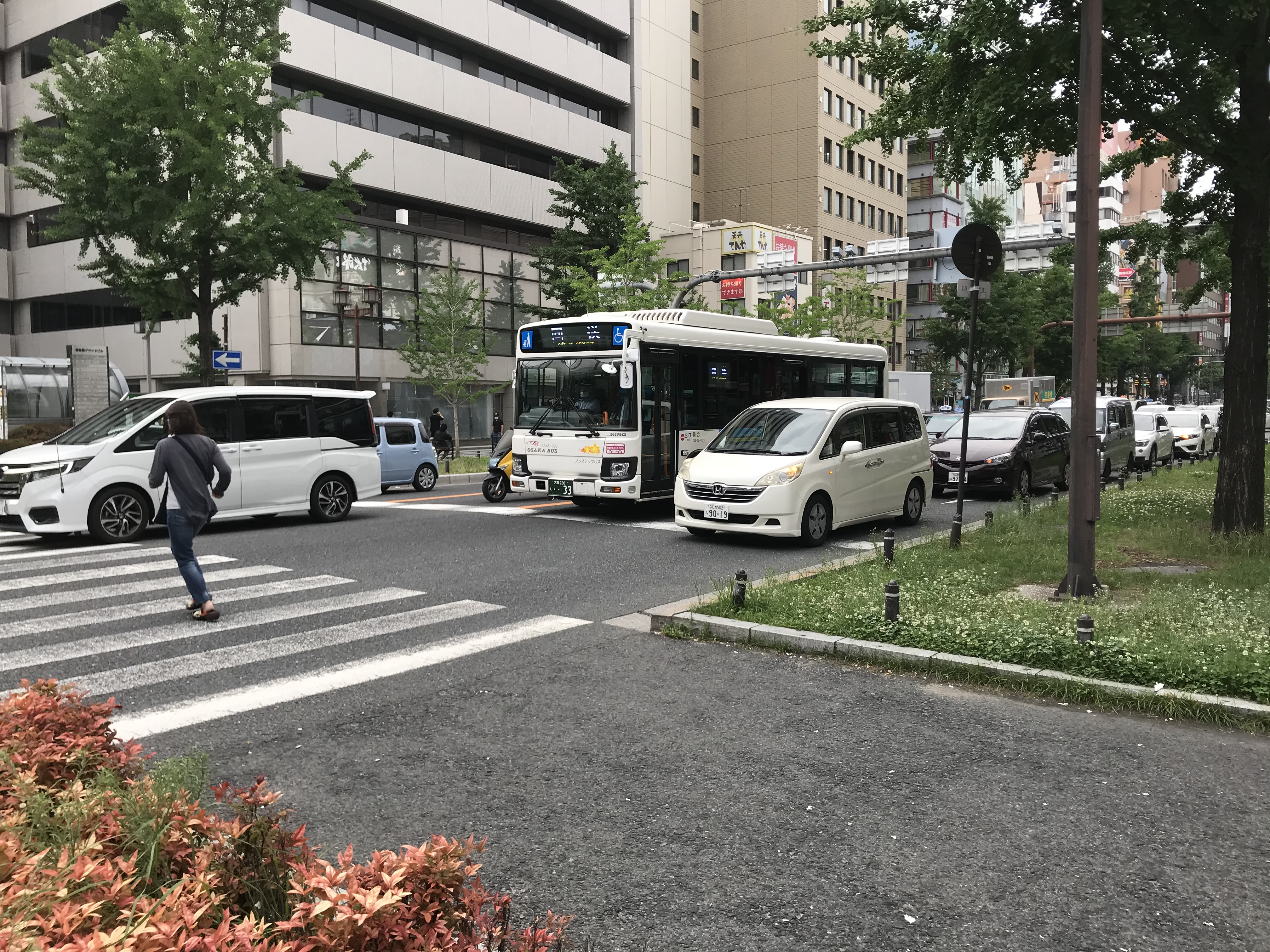 回送で直進の車線に入っていることから時間的に黒門市場に向かっていると思われる。